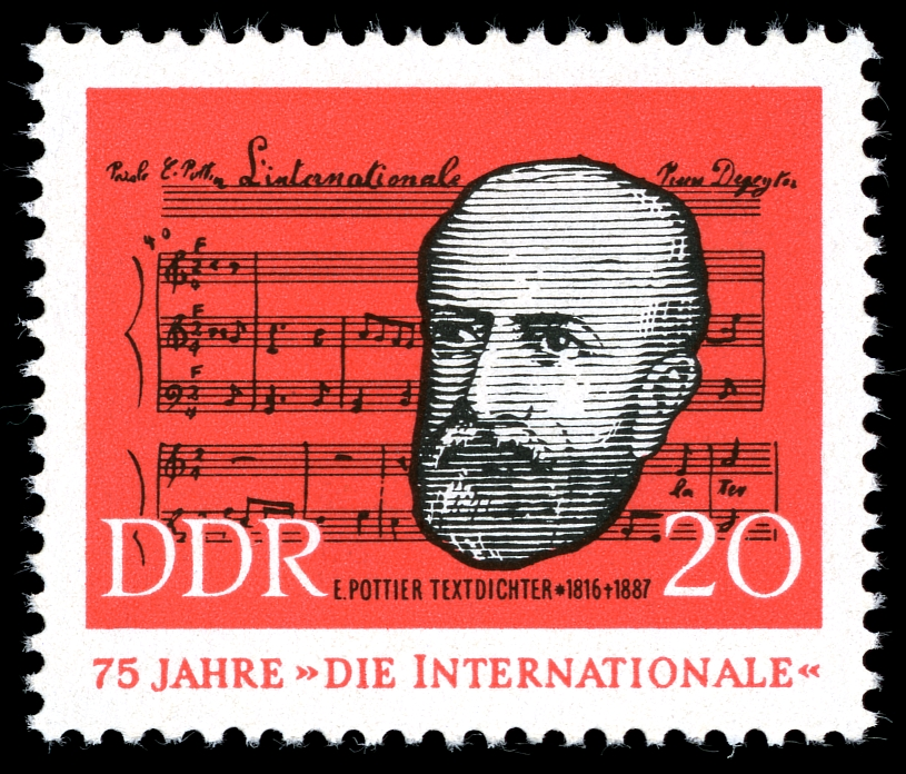 Ausgabepreis: Pfennig First Day of Issue / Erstausgabetag: Auflage: Entwurf: Druckverfahren: Michel-Katalog-Nr: Ländercode-MiNr